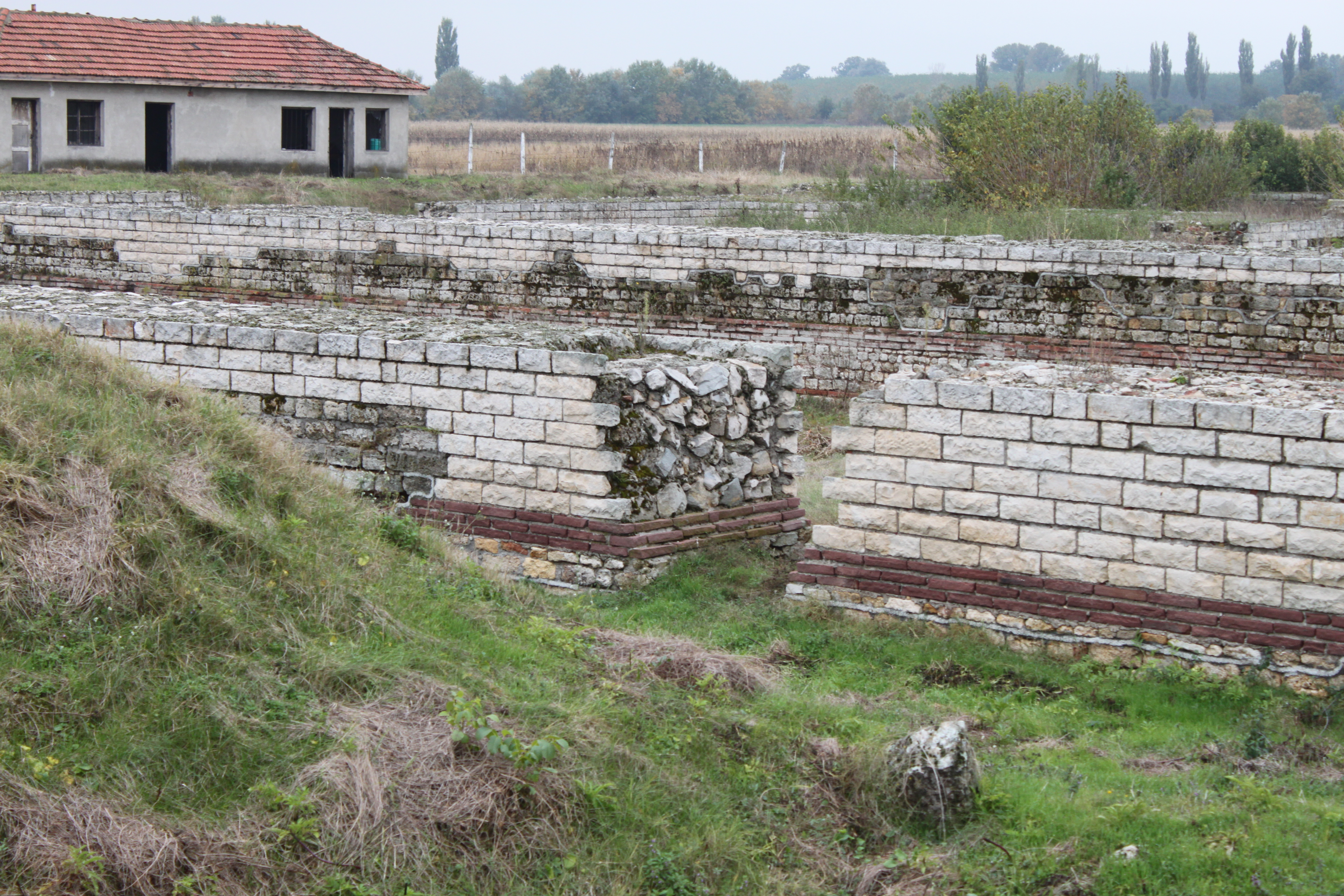 Colonia Ulpia Oescus: lateinisch Ulpia Escus; Nordbulgarien; an der Donau; beim Dorf Gigen; menschenleer; eingezäunt; gepflegte Anlage